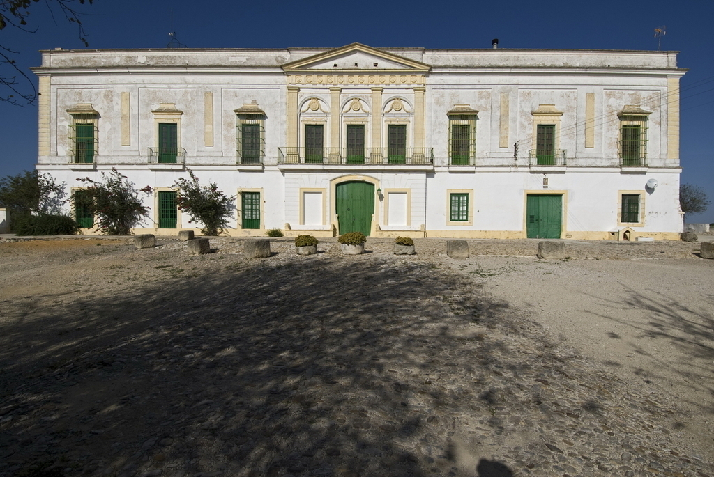 Fachada de la viña Cerro Nuevo, edificio atribuido al arquitecto francés Charles Garnier